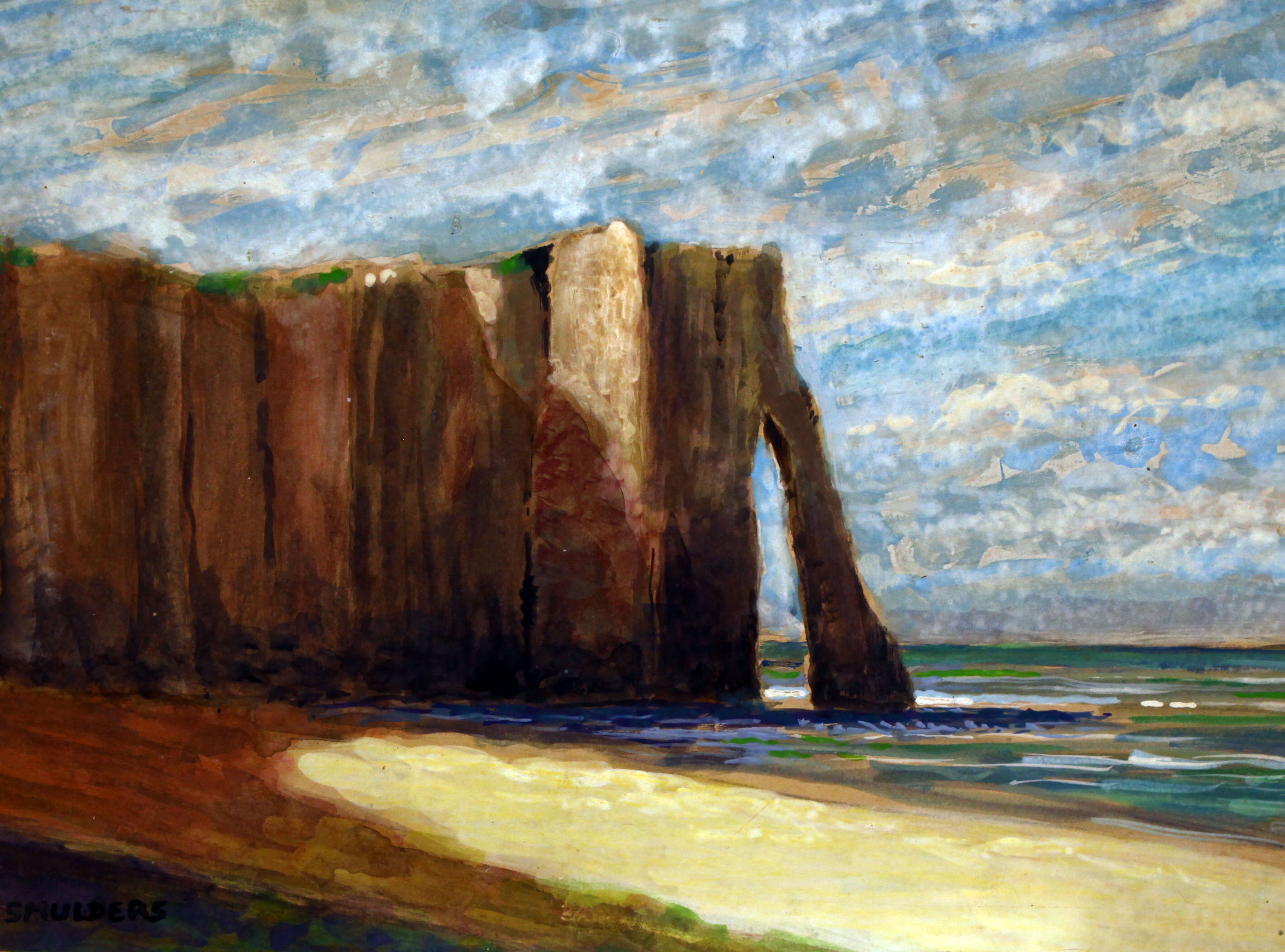 Kalkrosten bij Etretat in Normandie. Schilderij door Gab Smulders.